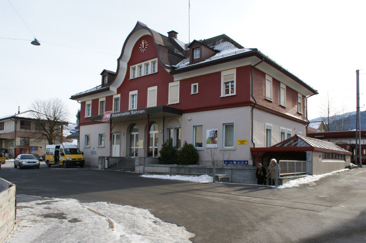 Bahnhof Appenzell der Appenzeller Bahnen von der Strassenseite her